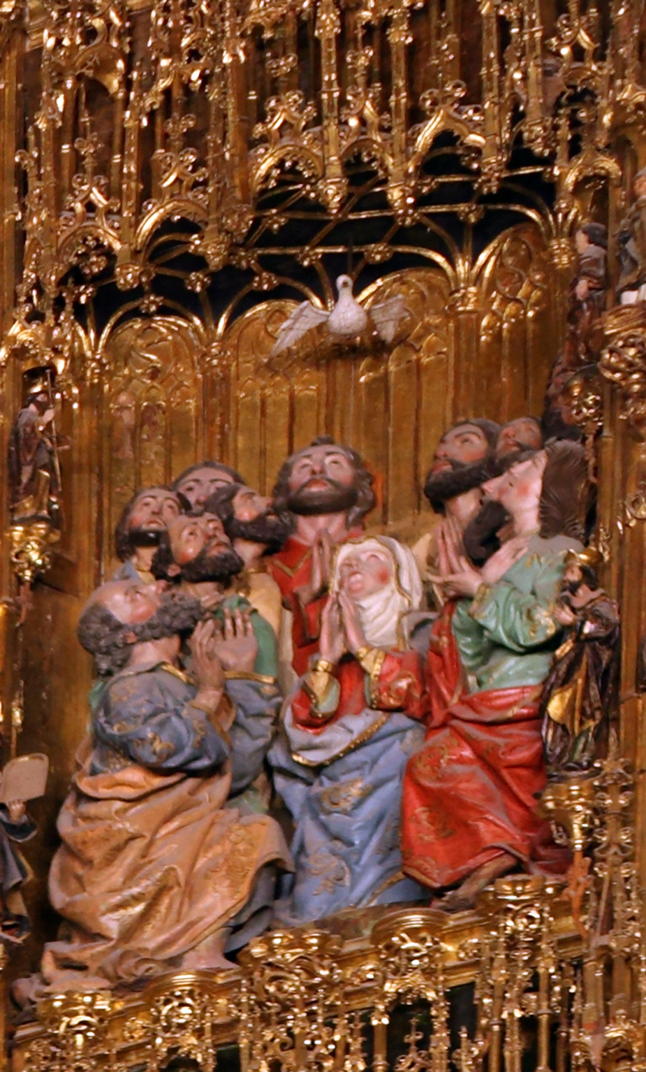 Pentecostés, dcetalle del retablo mayor de la Catedral de Toledo (España)